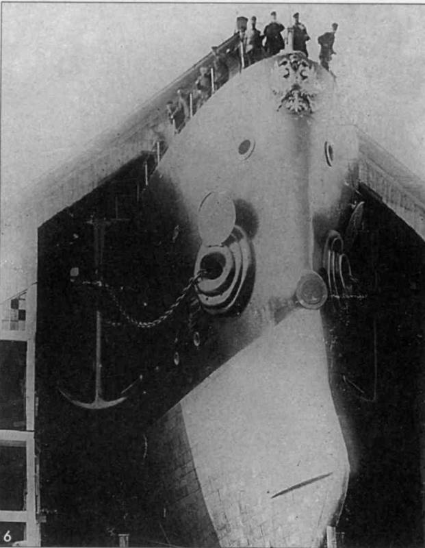 Крейсер I ранга «Аврора» в эллинге Нового Адмиралтейства